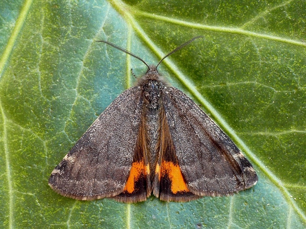 Archiearis notha - Slovakia, - Trenčín - Drietoma - na mokrej lesnej ceste pri potoku na okraji starého listnatého lesa